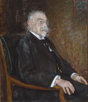 Bredo Henrik von Munthe af Morgenstierne (1851-1930), rektor ved Det Kongelige Frederiks Universitet. Malt 1920 av August Eiebakke (død 21. juli 1938). Opphavsrett utløp 21. juli 2008.